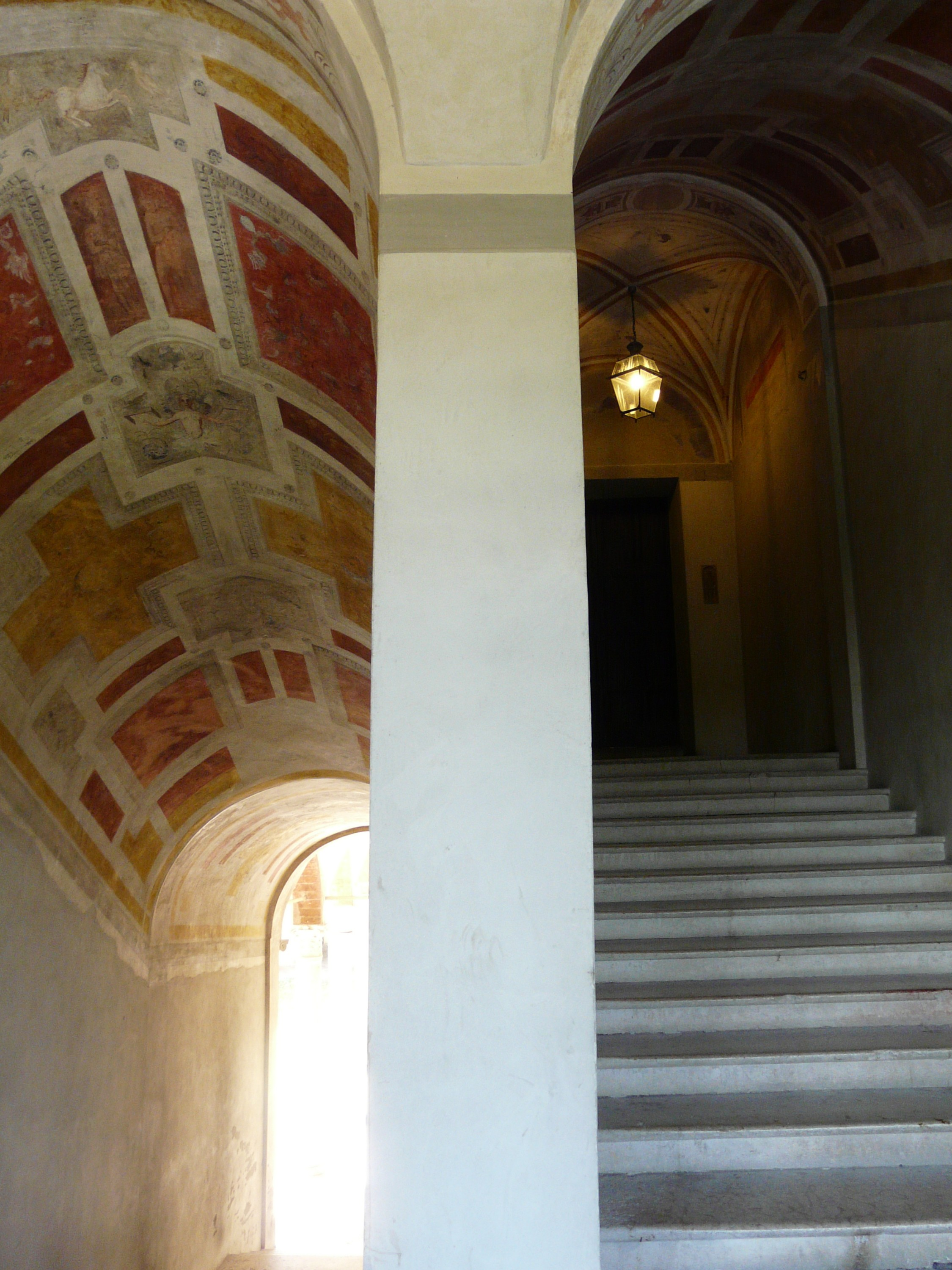 Rocca dei Rossi, San Secondo Parmense, Emilia-Romagna, Italia